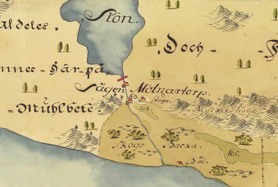 Del av Erstaviks ägor visande Erstaviks kvarn